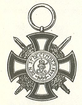 Scan van Blz. 158 van het boek "Handbuch der Ritter- und Verdienstorden " uitgegeven 1893 door Weber.Tekening van de in 1902 overleden Maximilian Gritzner. Robert Prummel 10 jul 2008 16:40 (CEST)